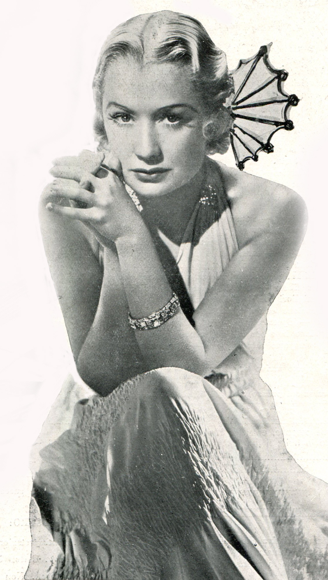 Miriam Hpokins - foto di scena di Barbary Coast - 1936 - immagine pubblicata in Italia - dicembre 1936 - prod Un Art